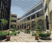 UFE garden